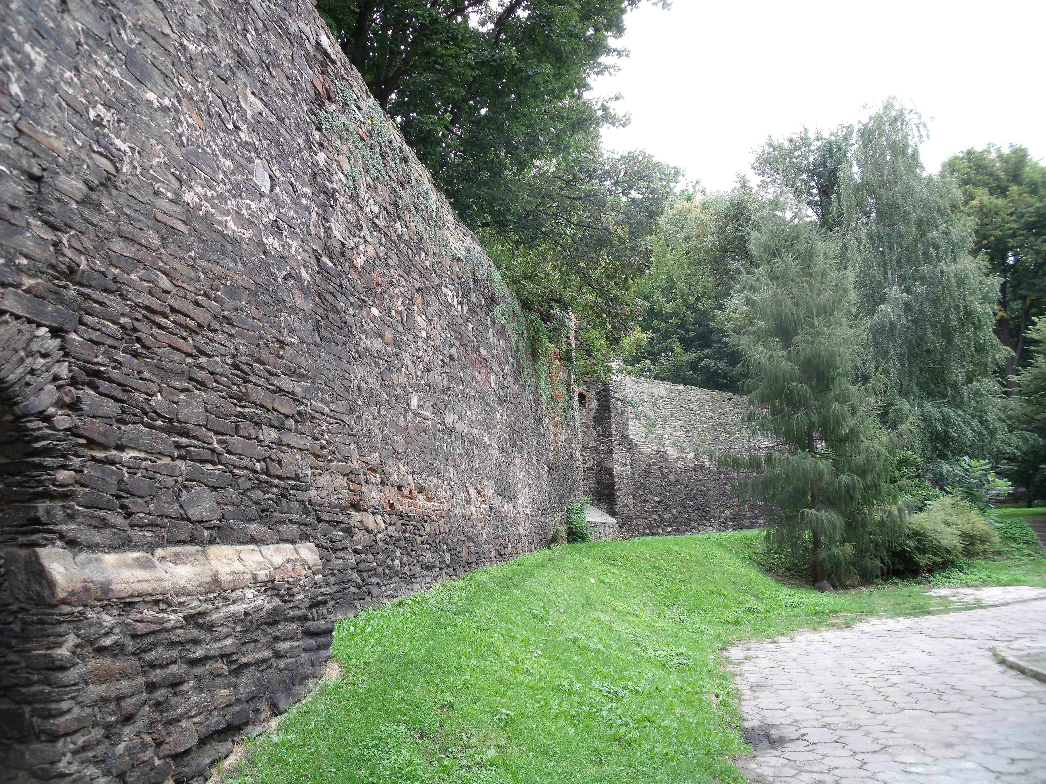 Paczków - mury miejskie (zabytek nr rejestr. A/923)